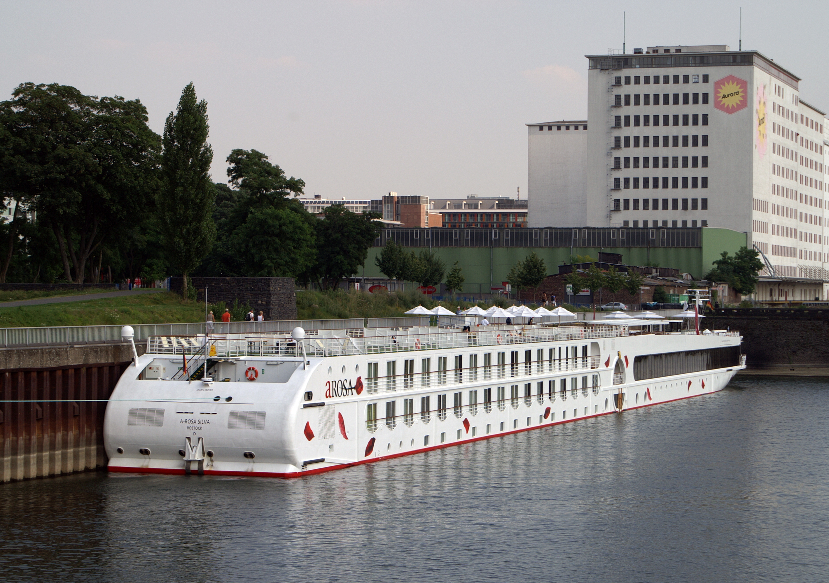 Flusskreuzfahrtschiff A-Rosa Silva im Deutzer Hafen in Köln.